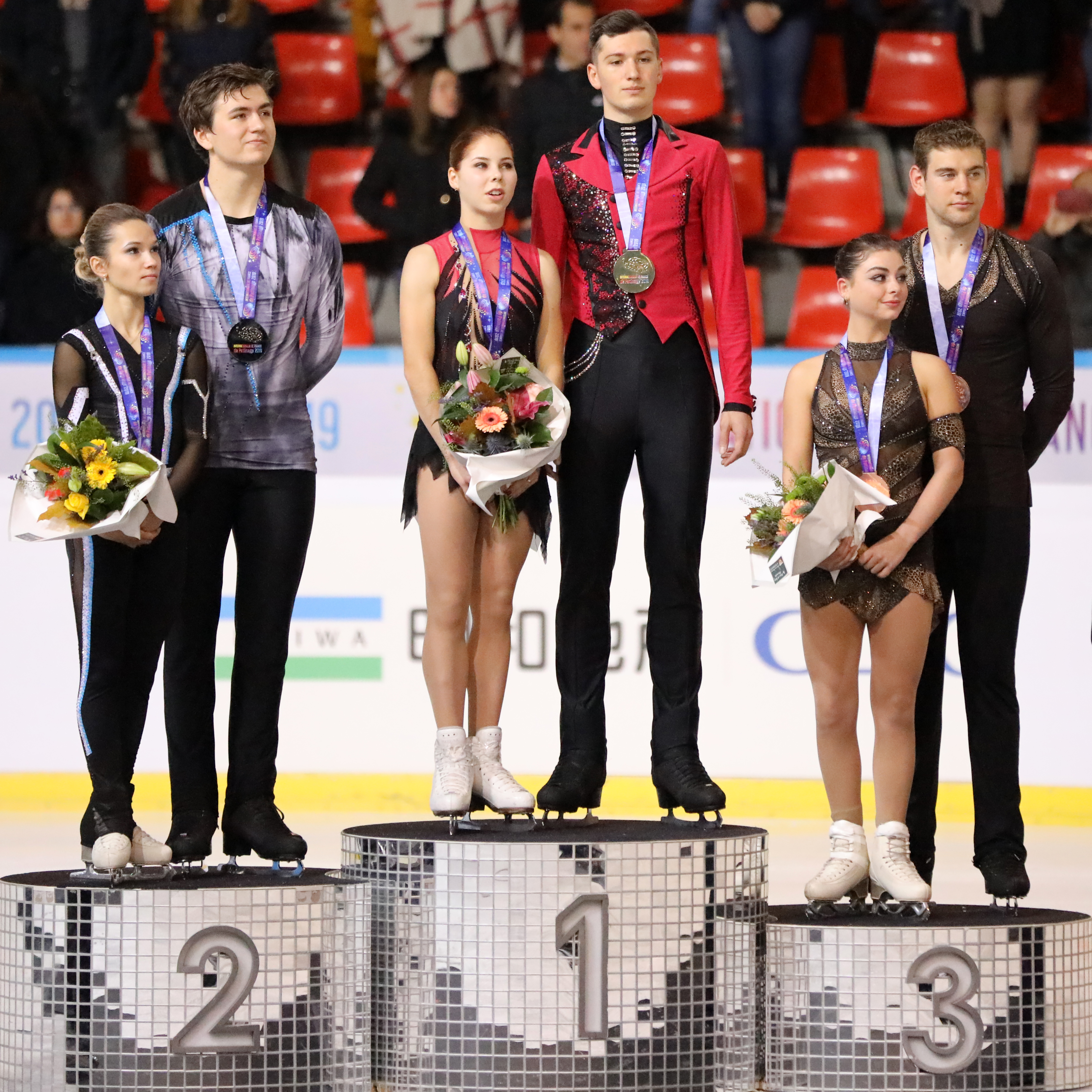 Internationaux de France 2019